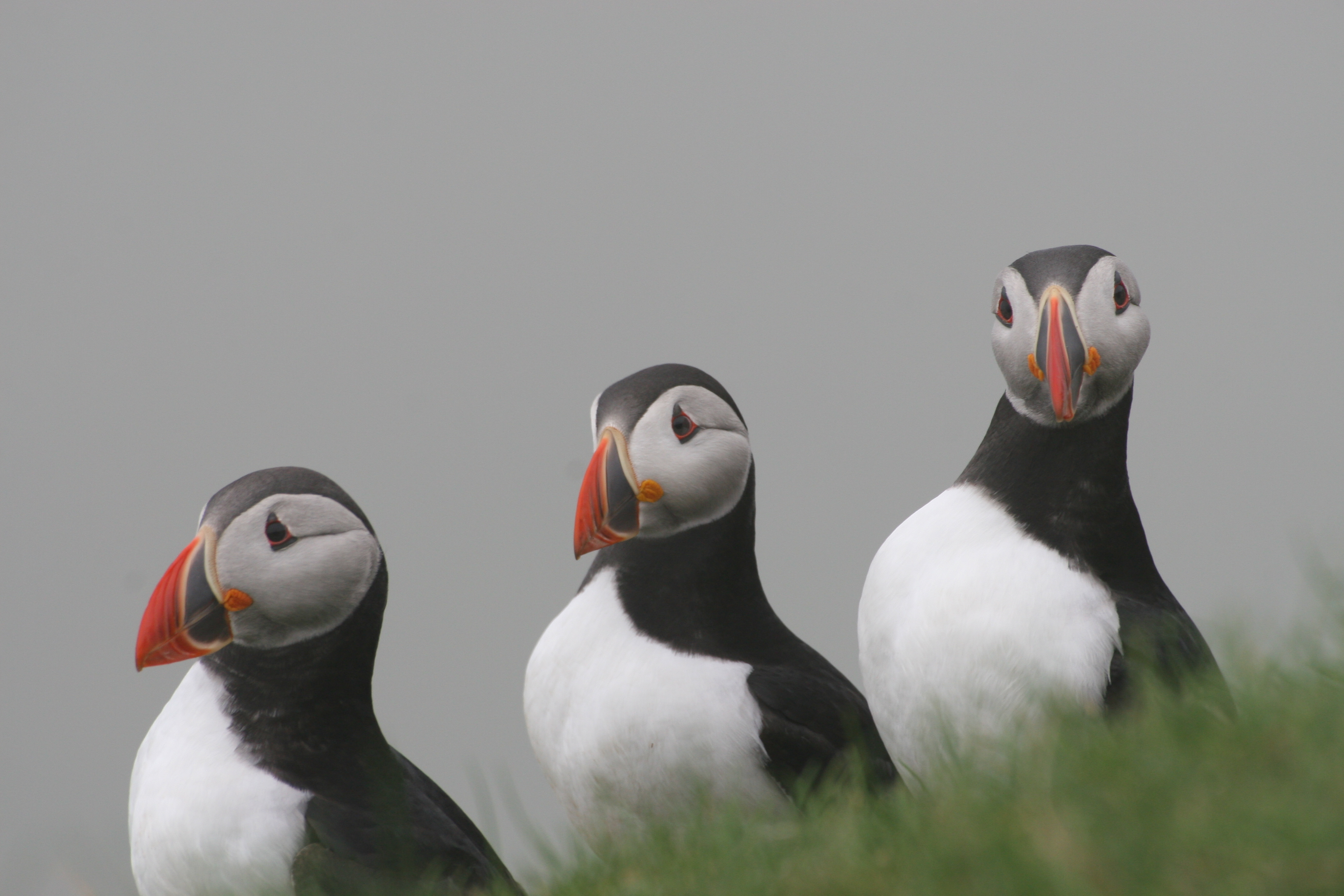 Drei Papageitaucher (Fratercula arctica) auf Mykines, Färöer